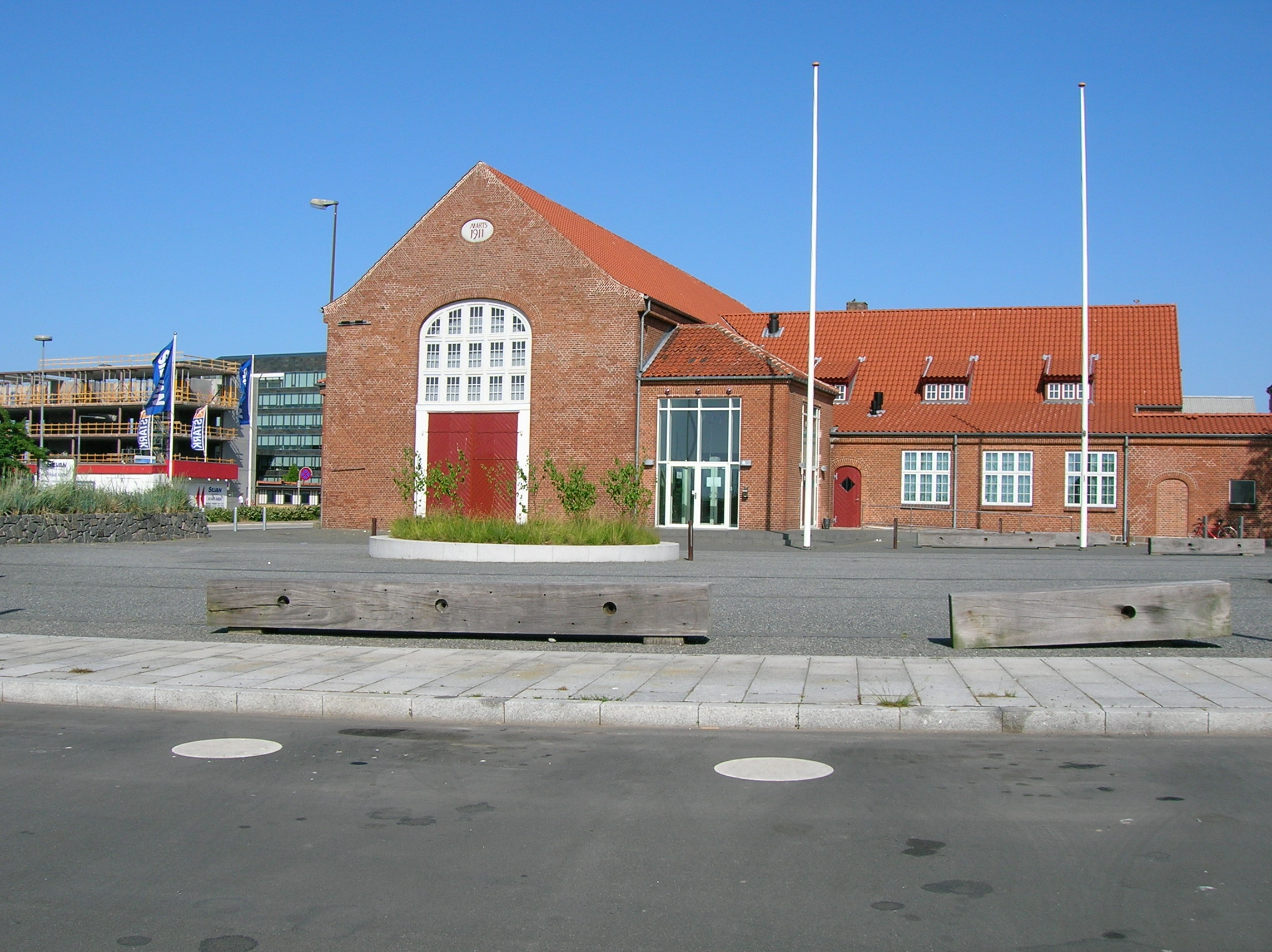 Musikhus Elværket